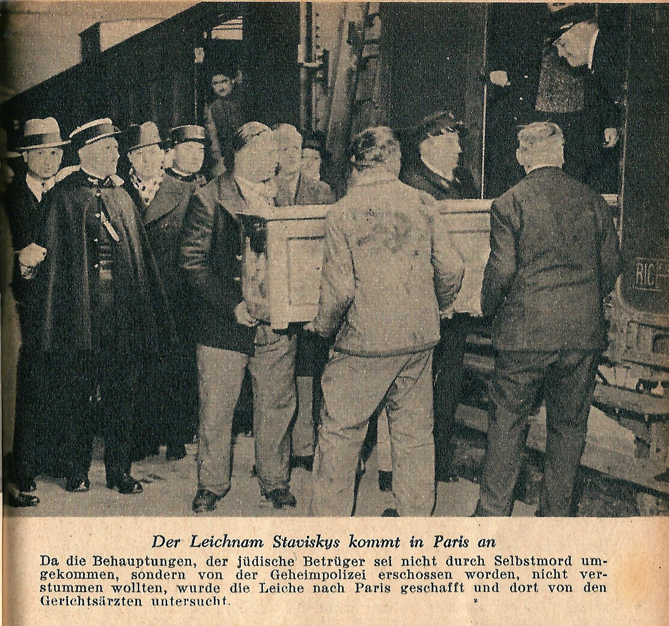 Image relative à l'Affaire Stavisky. Note importante : les légendes en allemand sont celles d'un document de propagande nazi.